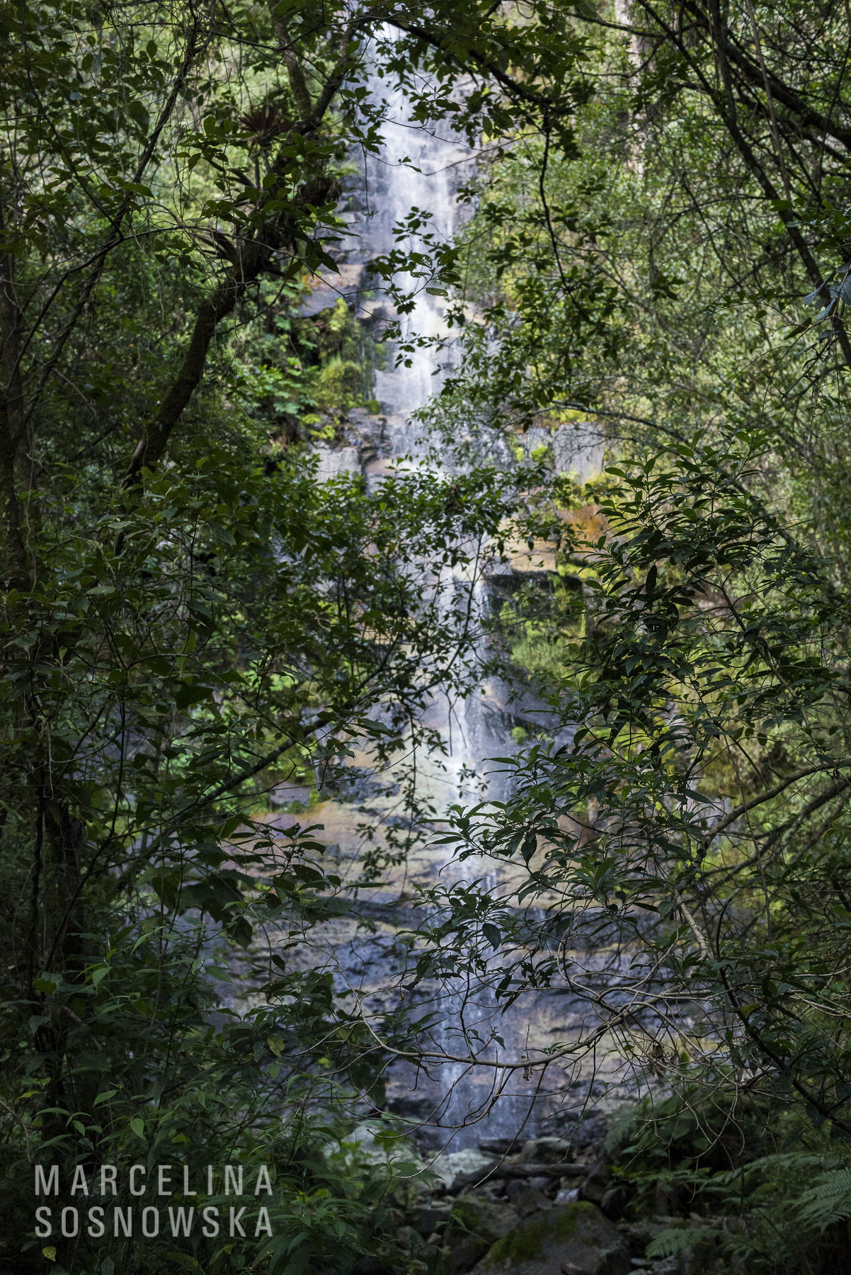 Cascada situado al lado de Palermo Boyaca